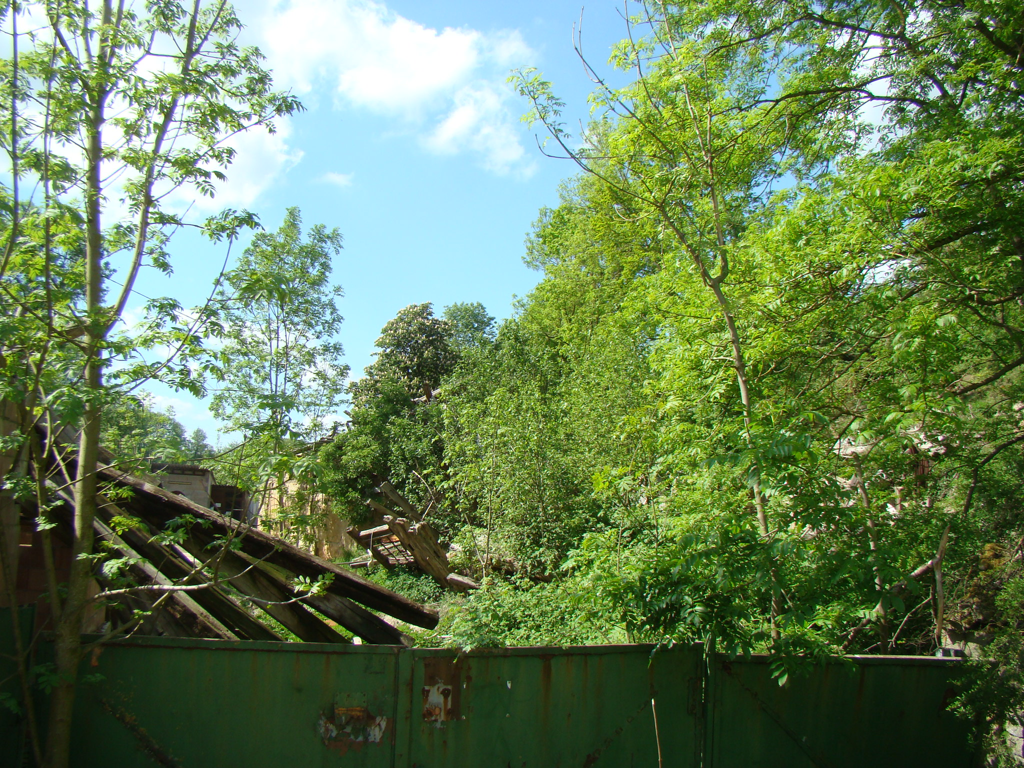 Alte Mühle in Heilbronn-Biberach, eingestürzt seit 2007, inzwischen größtenteils überwachsen